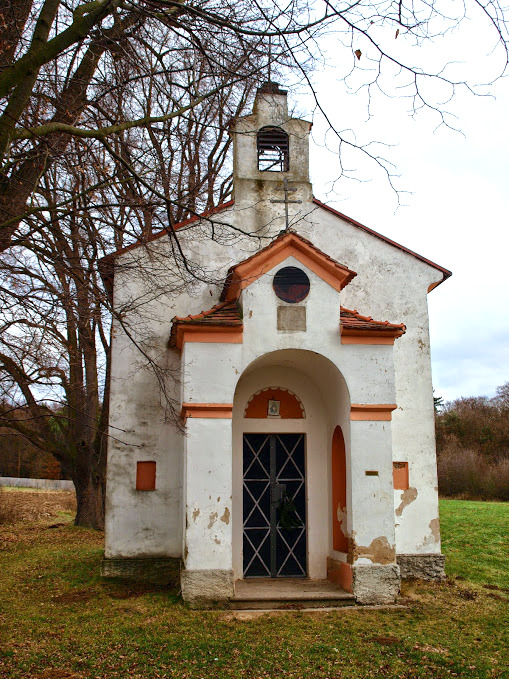 Kaple Jména Panny Marie (Zdiměřice)